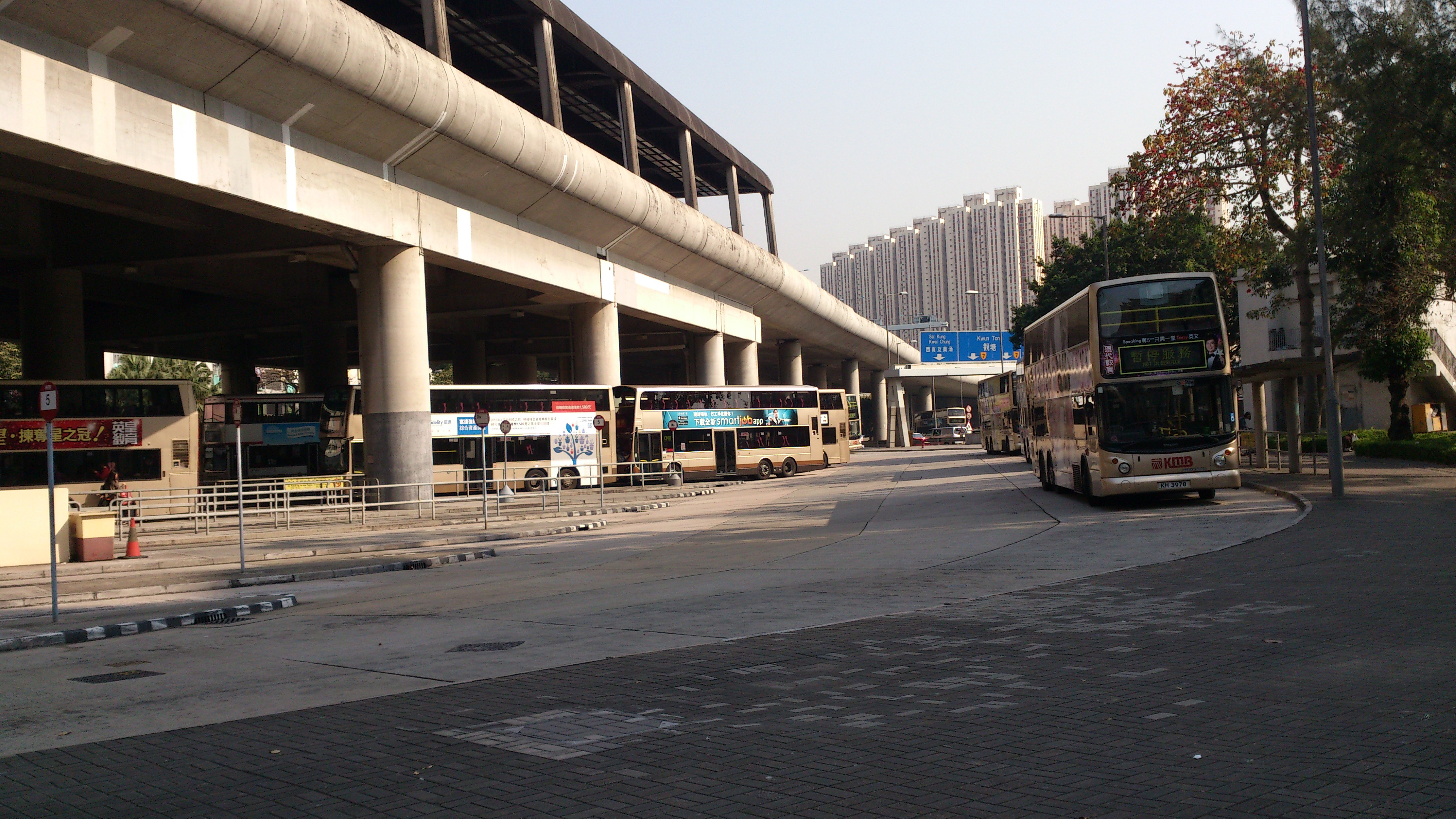 彩虹巴士站